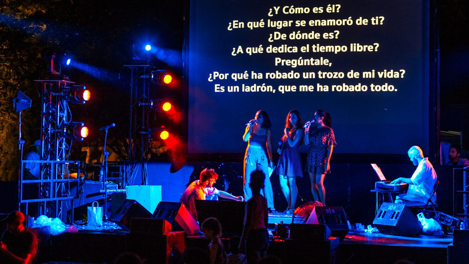 Un concierto que se desborda hasta el punto incluso de que el concertista desaparece y el concierto queda en manos de los invitados y el público. Un concierto que empieza como cualquier otro, se llena de intrusos y acaba siendo un karaoke popular. Es el proyecto de Anto Rodríguez, un creador escénico cuyas piezas están a medio camino entre la performance, el teatro y el concierto, y que anoche, dentro de los Veranos de la Villa, tomó Villaverde. Allí, en el parque Huerta del Obispo, se entonaron canciones de José Luis Perales, Raphael, la veraniega Eva María de Fórmula V o Billie Jean de Michael Jackson, entre muchas otras. Mientras, los creadores usaban máquina de humo, luces de colores, ventiladores, confeti dorado, pelotas de playa, burbujas y otros “efectos especiales” para que quien subiera a cantar se sintiera en un auténtico videoclip.